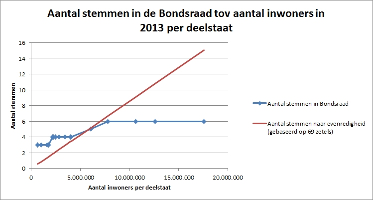 Aantal stemmen in de Bondsraad tov aantal inwoners in 2013 per deelstaat. Gebaseerd op de gegevens in dit artikel